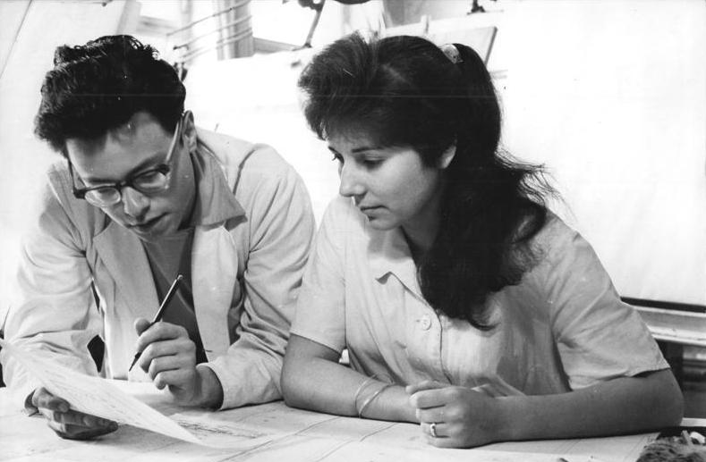 Ingenieure mit Konstruktionsplänen Zentralbild Wittig 19.5.1960 Zum 9. Plenum des ZK der SED Im VEB Starkstromanlagenbau in Erfurt Energieerzeugungs- und Verteilungsanlagen, Neu- und Erweiterungsanlagen im Zuge der Mechanisierung und Automatisierung für alle Industriezweige stehen u. a. auf dem Fertigungsprogramm des VEB Starkstromanlagenbau Erfurt. Als Sonderfertigung stellt den Betrieb die elektrischen Teile von Fördermaschinen für den Bergbau, von Klimaanlagen für den gesamten Schiffsbau unserer Republik und von automatischen Getreidespeicheranlagen her. UBz: Die Konstruktionsunterlagen für elektrische Teile der Klimaanlage des im Bau befindlichen Urlaubserschiffes hat eine Brigade des Konstruktionsbüros in freiwilliger Arbeit zusätzlich übernommen. Konstrukteur Otto Ronneberger und die technische Zeichnerin Ursula Kämmirzahl besprechen eine Aufbauzeichnung.